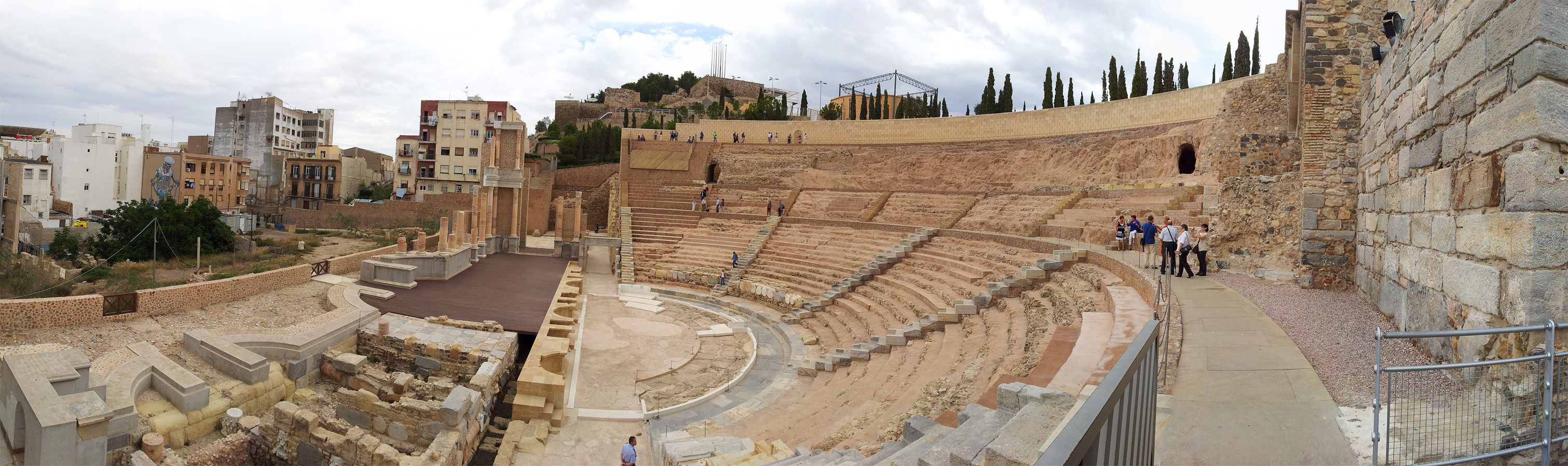 Vista panorámica del Teatro Romano de Cartagena.